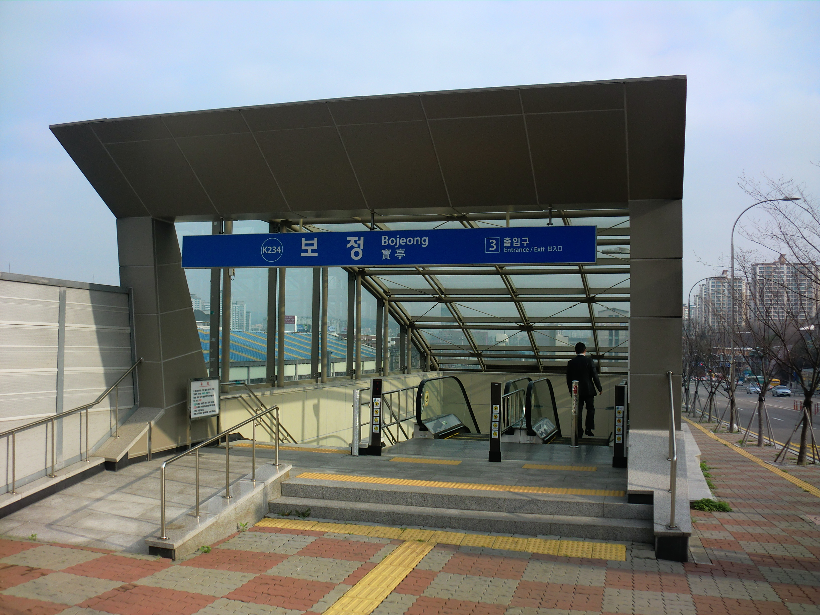 분당선 보정역 3번출구